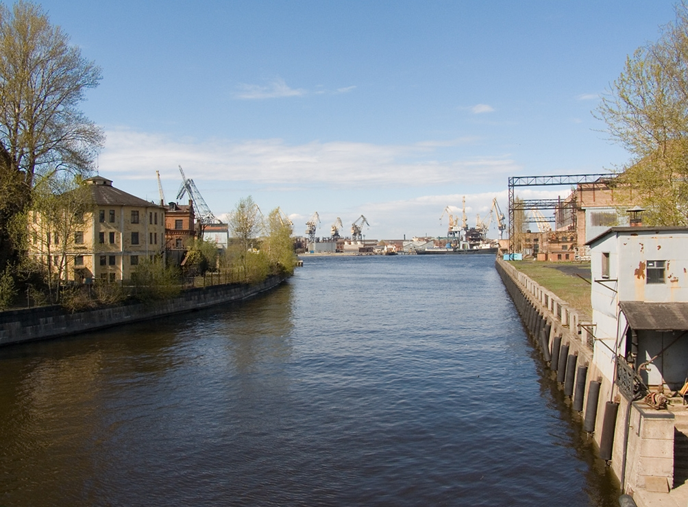 Ekateringofka river